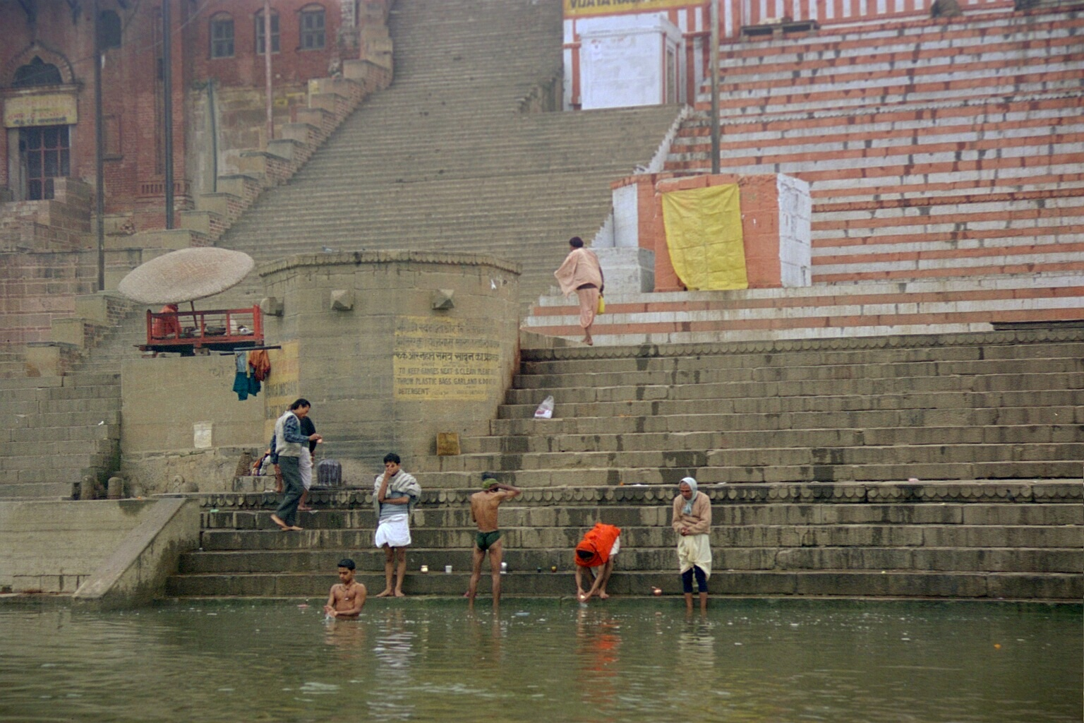 Ghats in Varanasi, India